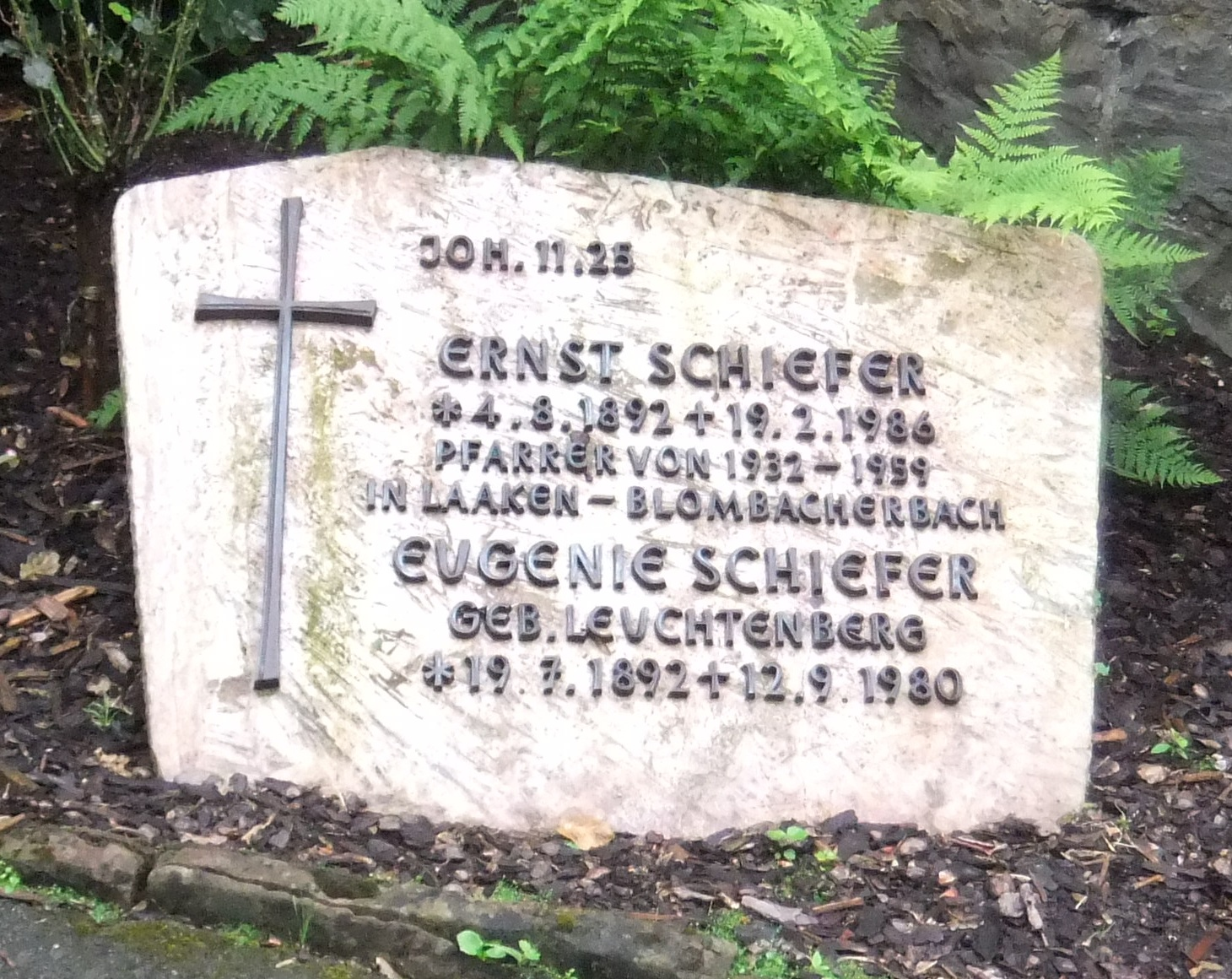 Ansichten der Evangelischen Kirche im Wuppertaler Ortsteil Laaken